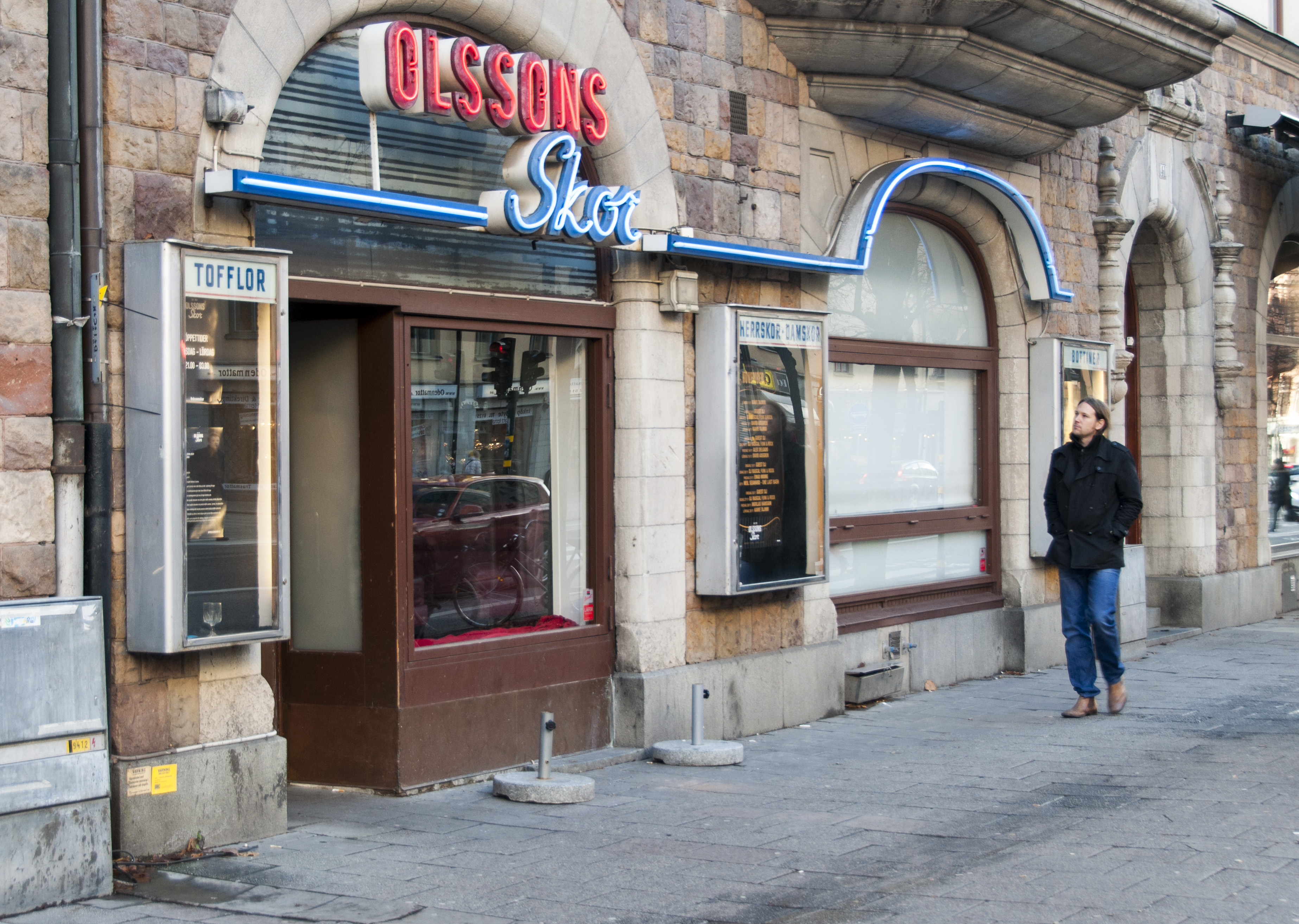 Olssons skor neonskylt, Odengatan 41